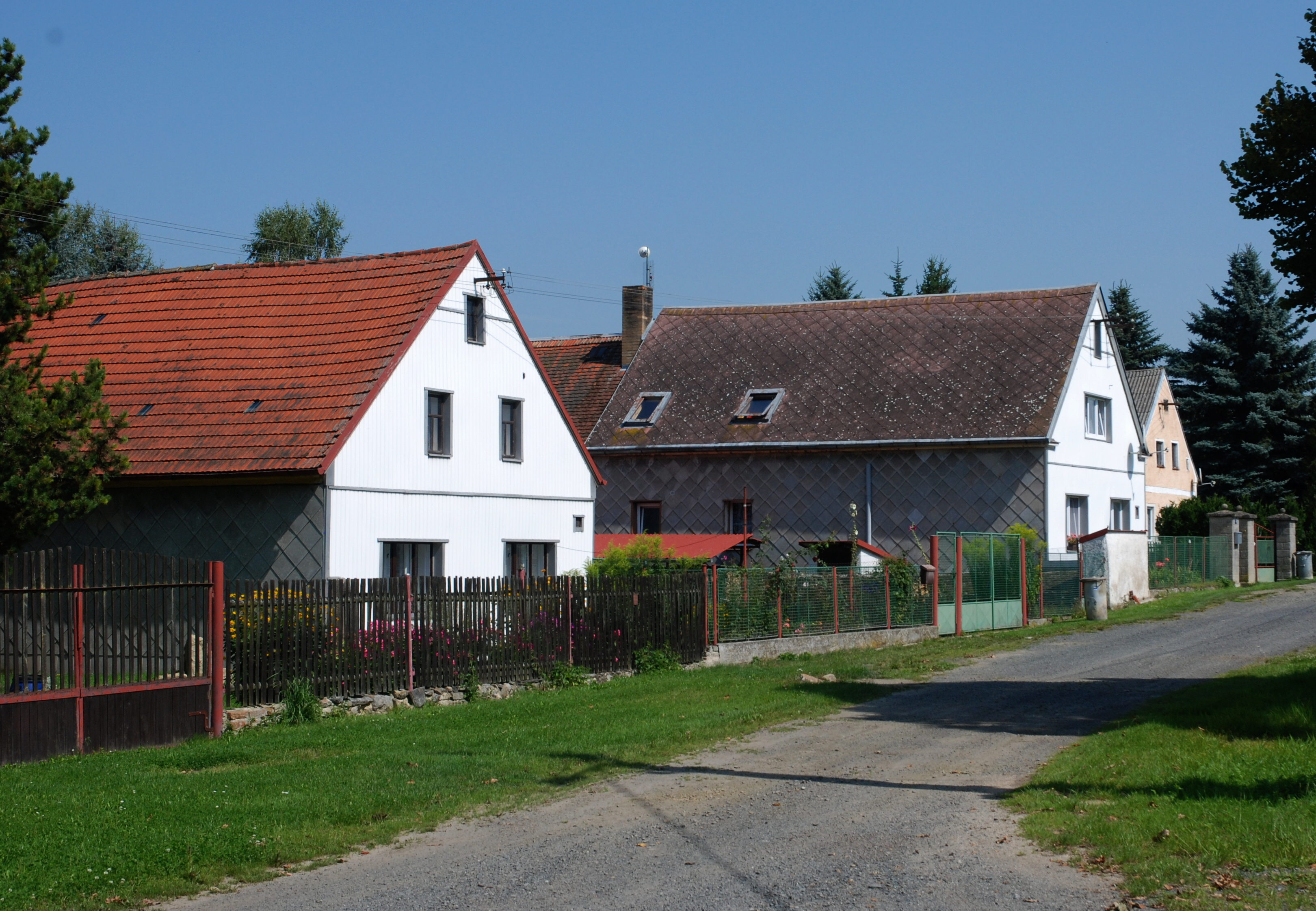 Pohled na chalupy Hlinného